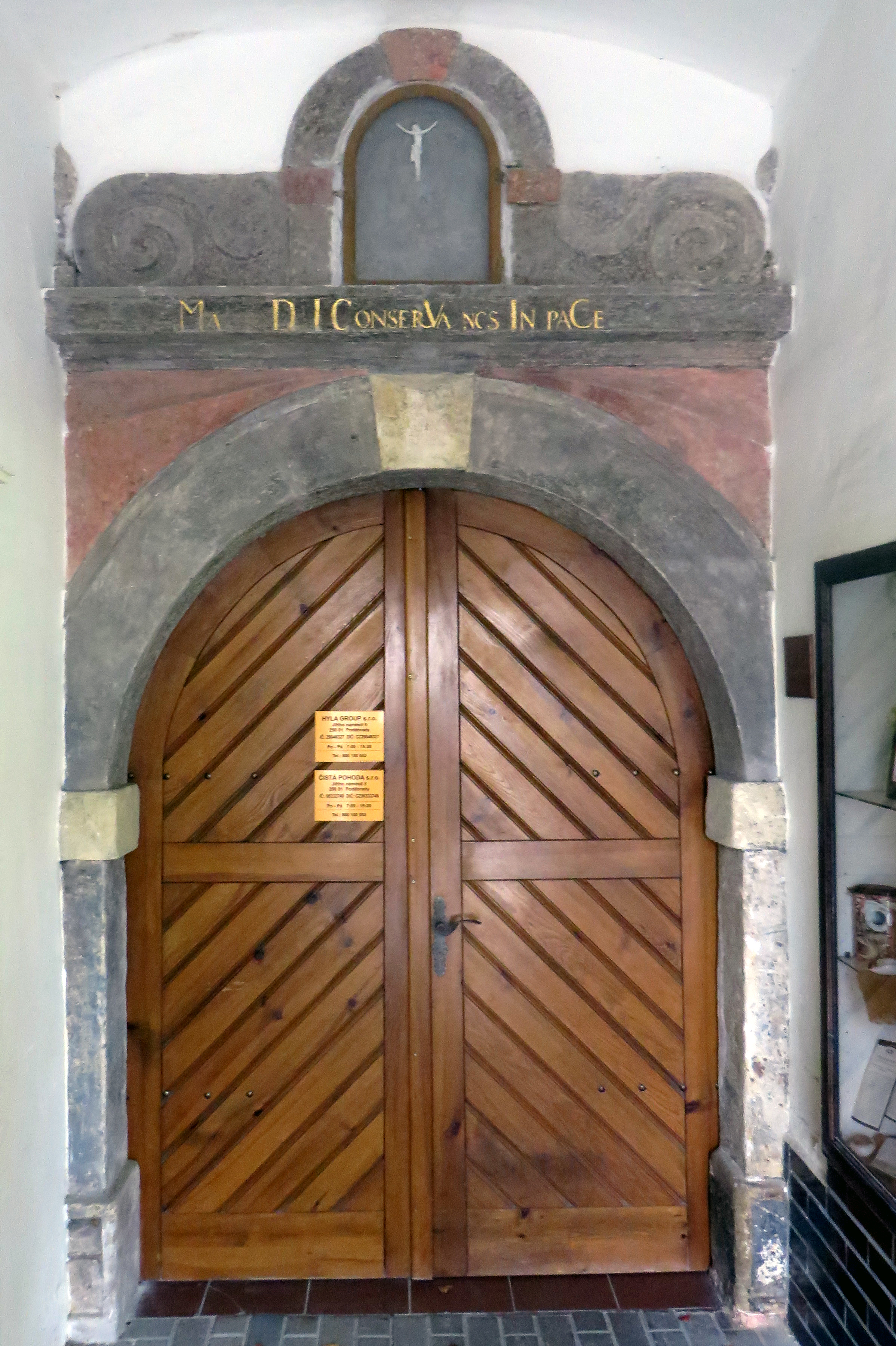 Měšťanský dům čp. 5 v Poděbradech. Barokní pískovcový portál s výklenkem. Na římse nápis s chronogramem: Mater Dei Conserva Nos in Pace (= 1707).